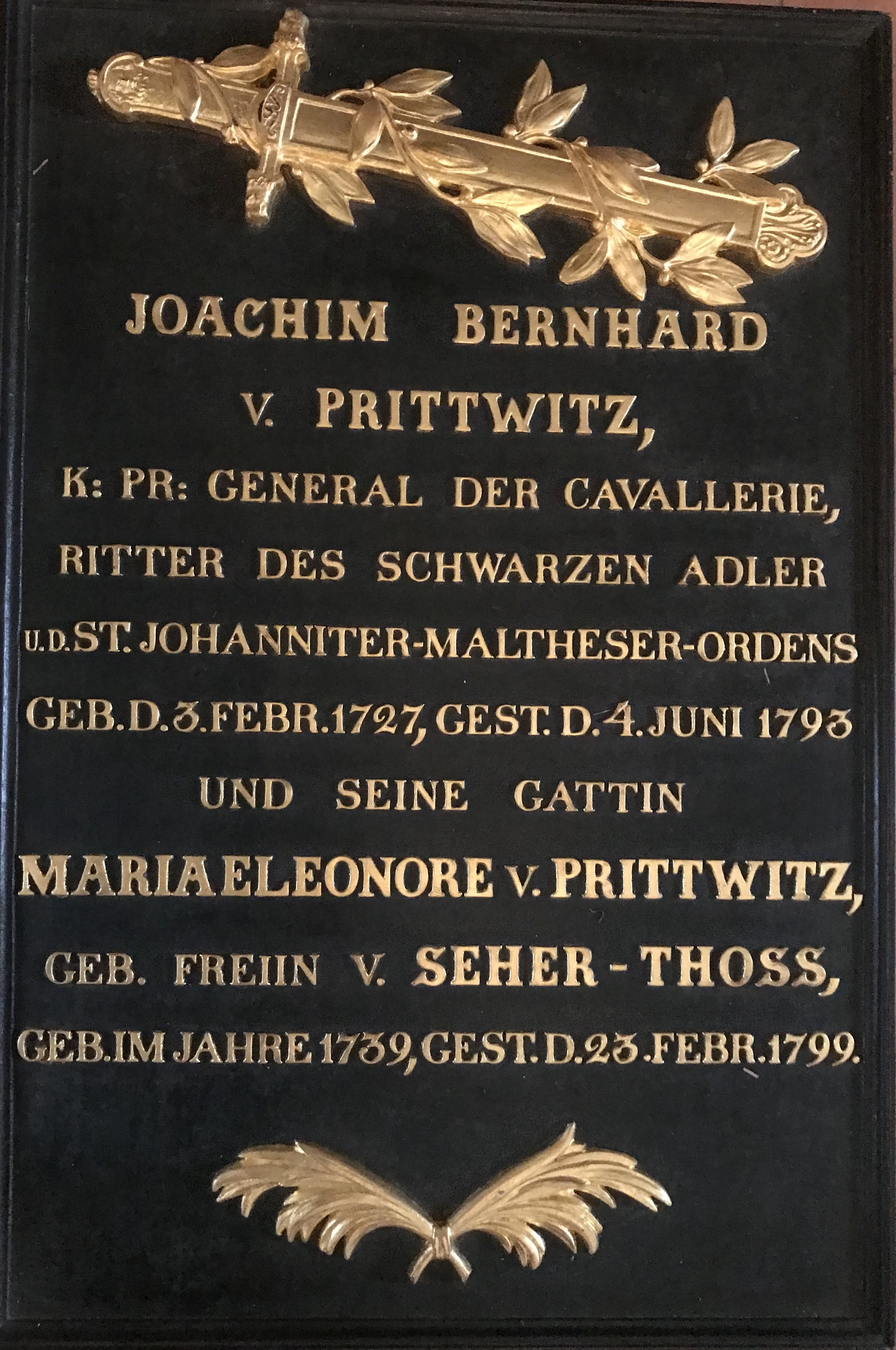 Gusseiserne Grabtafel für den General der Kavallerie Joachim Bernhard von Prittwitz und seine Ehefrau Eleonore, geborene Freiin von Seherr-Thoss in der Schinkelkirche von Neuhardenberg